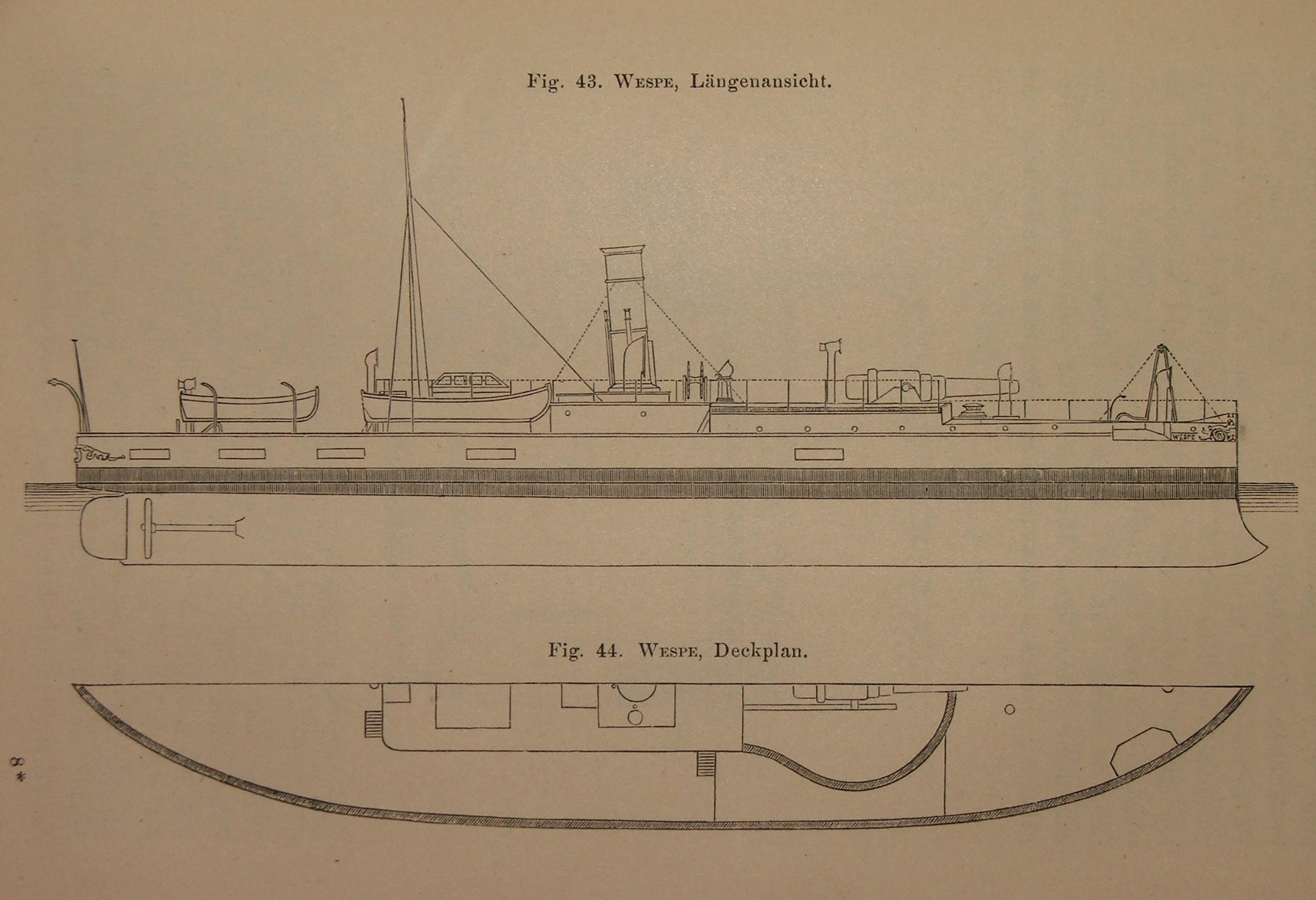 SMS Wespe Fig. 43 in von Kronenfels, J. F.: Das schwimmende Flottenmaterial der Seemächte. Eine kurzgefasste Beschreibung der wichtigsten europäischen, amerikanischen und asiatischen Kriegsschiffe der neueren und neuesten Zeit. A. Hartleben's Verlag, Wien. Pest. Leipzig 1881.